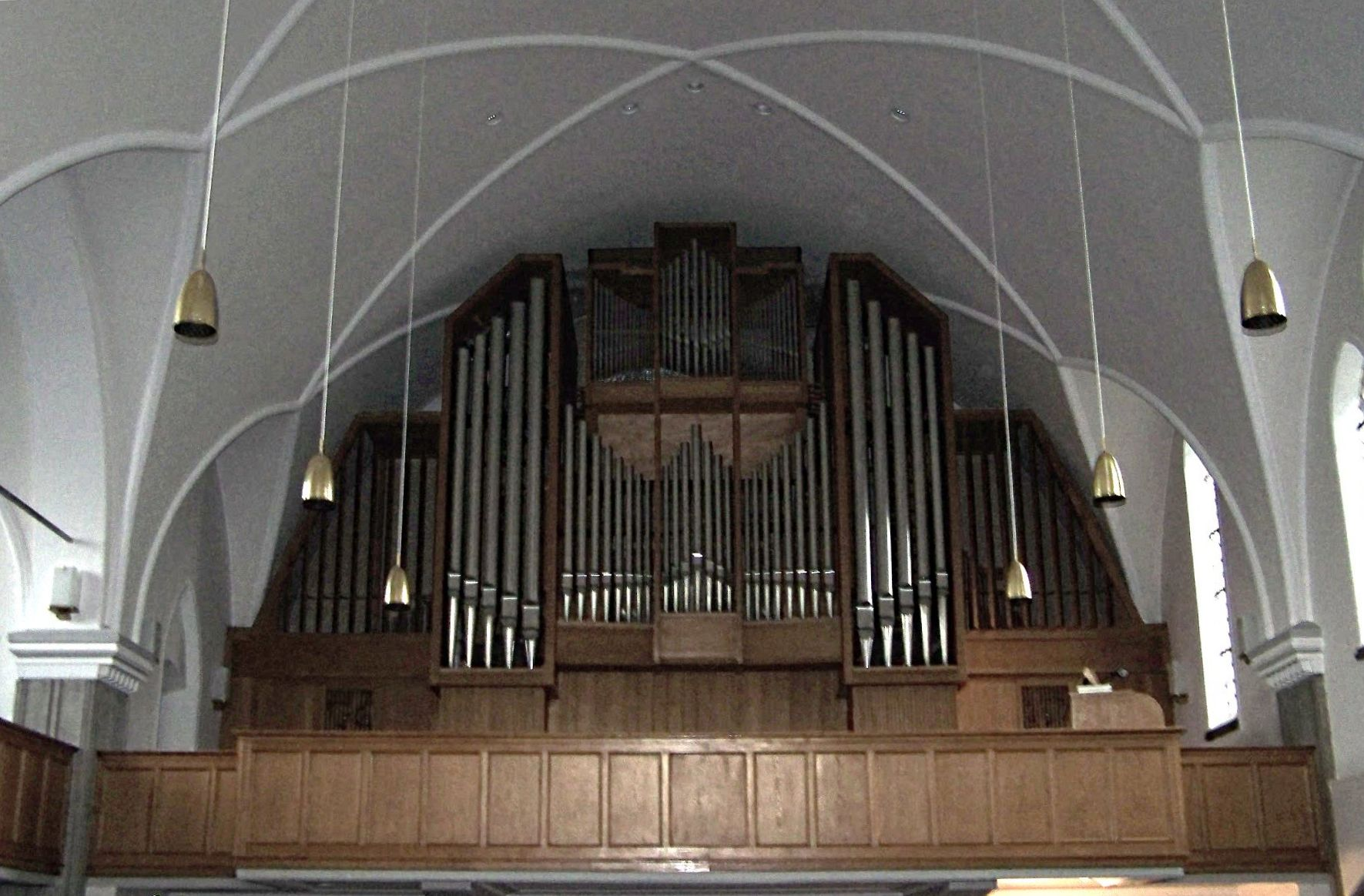 Erkner, Genezareth-Kirche, Sauer-Orgel (2008-09-24)